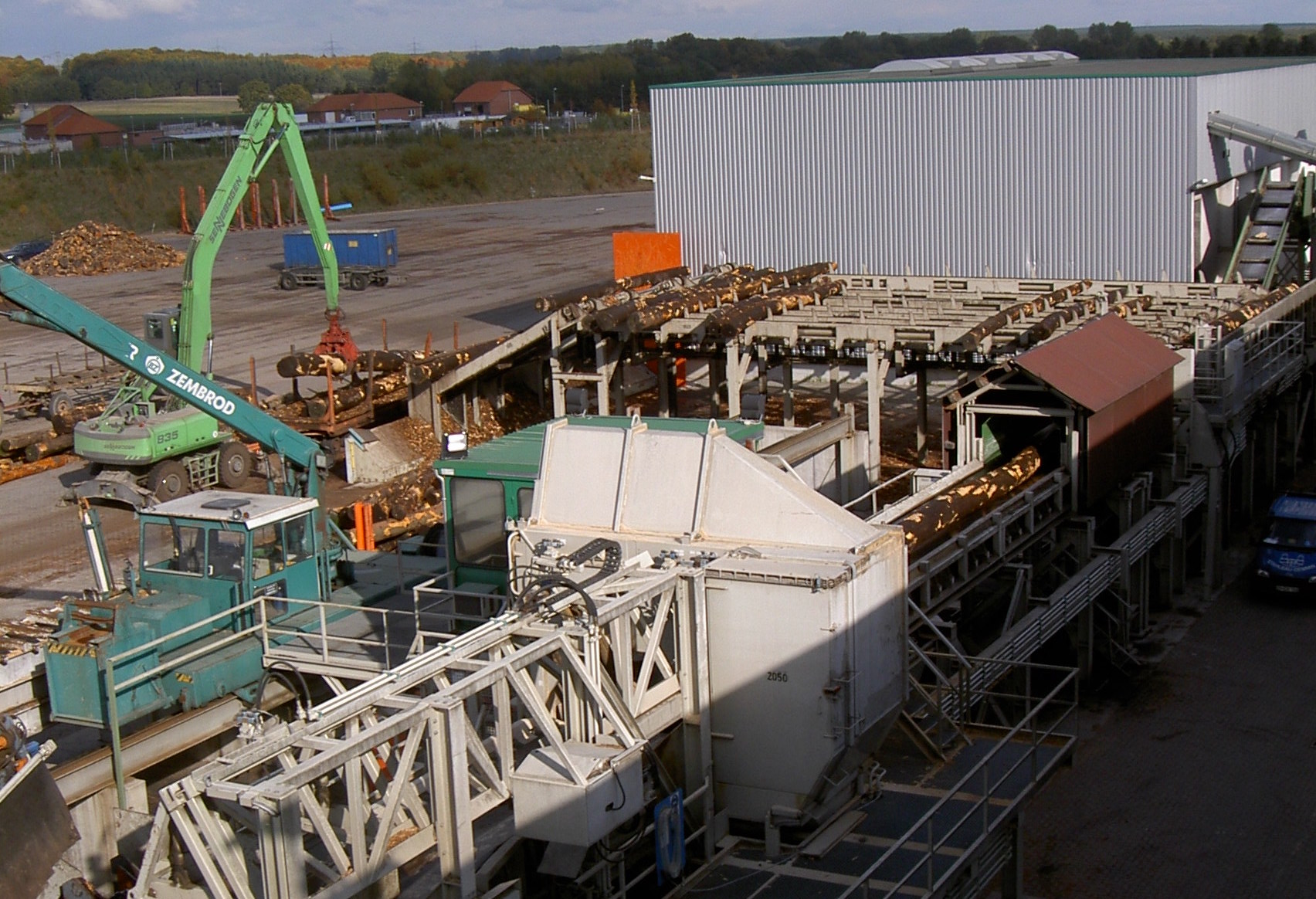 Wiedereröffnung des Werks in Malchow